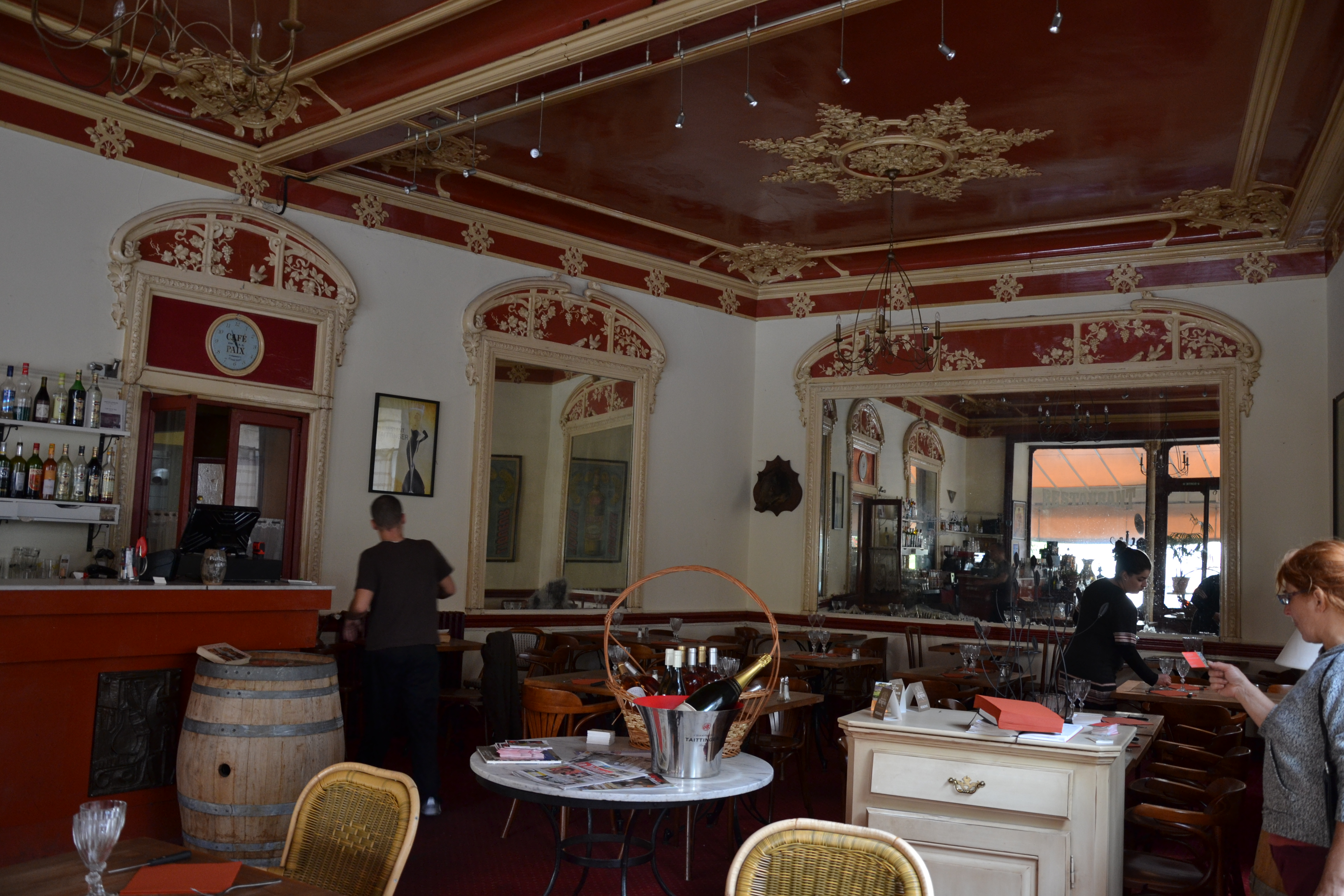 Café de la Paix de Valréassalle, élévation, décor intérieur